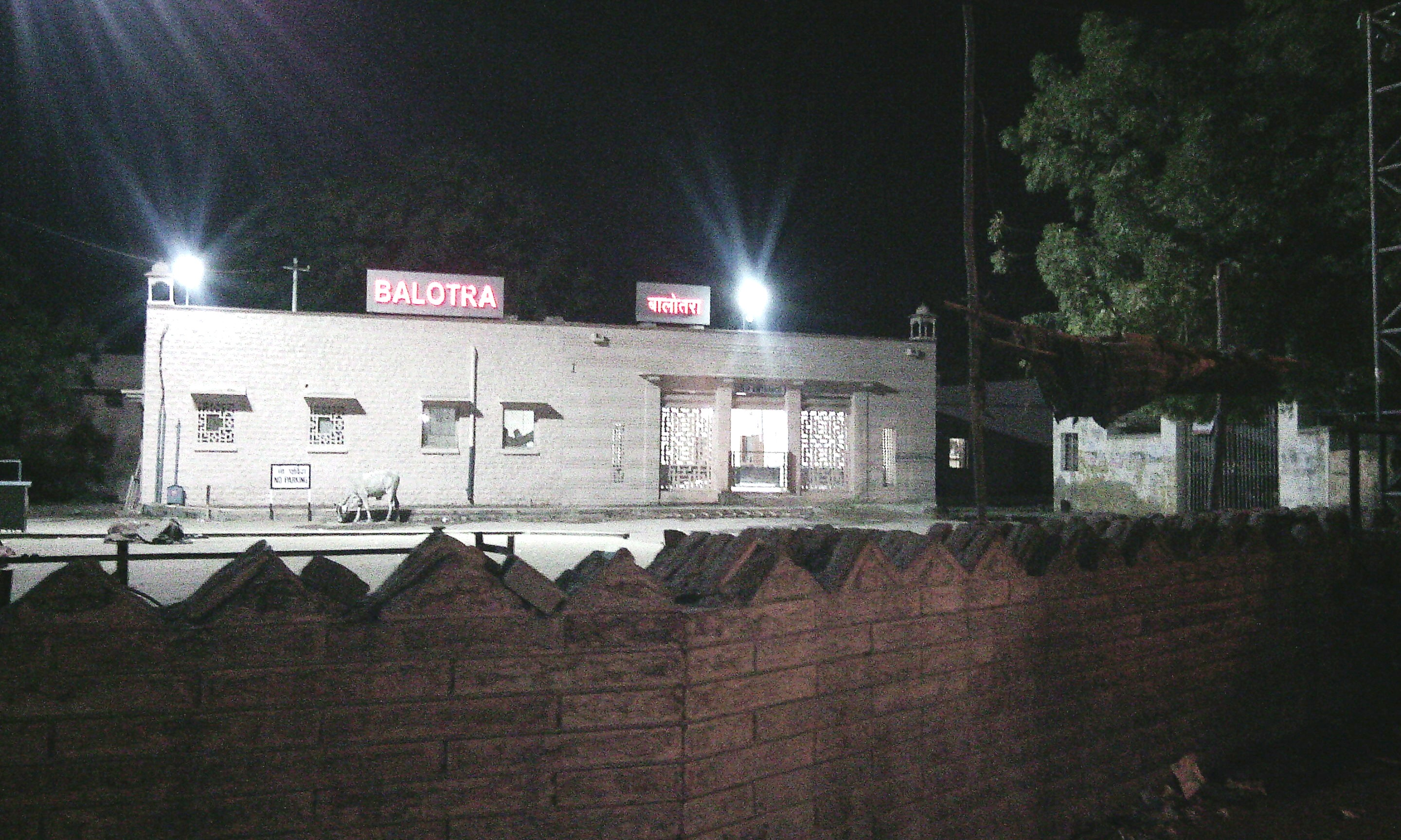 रात्रि में बालोतरा रेल्‍वे स्‍टेशन का बाहरी चित्र